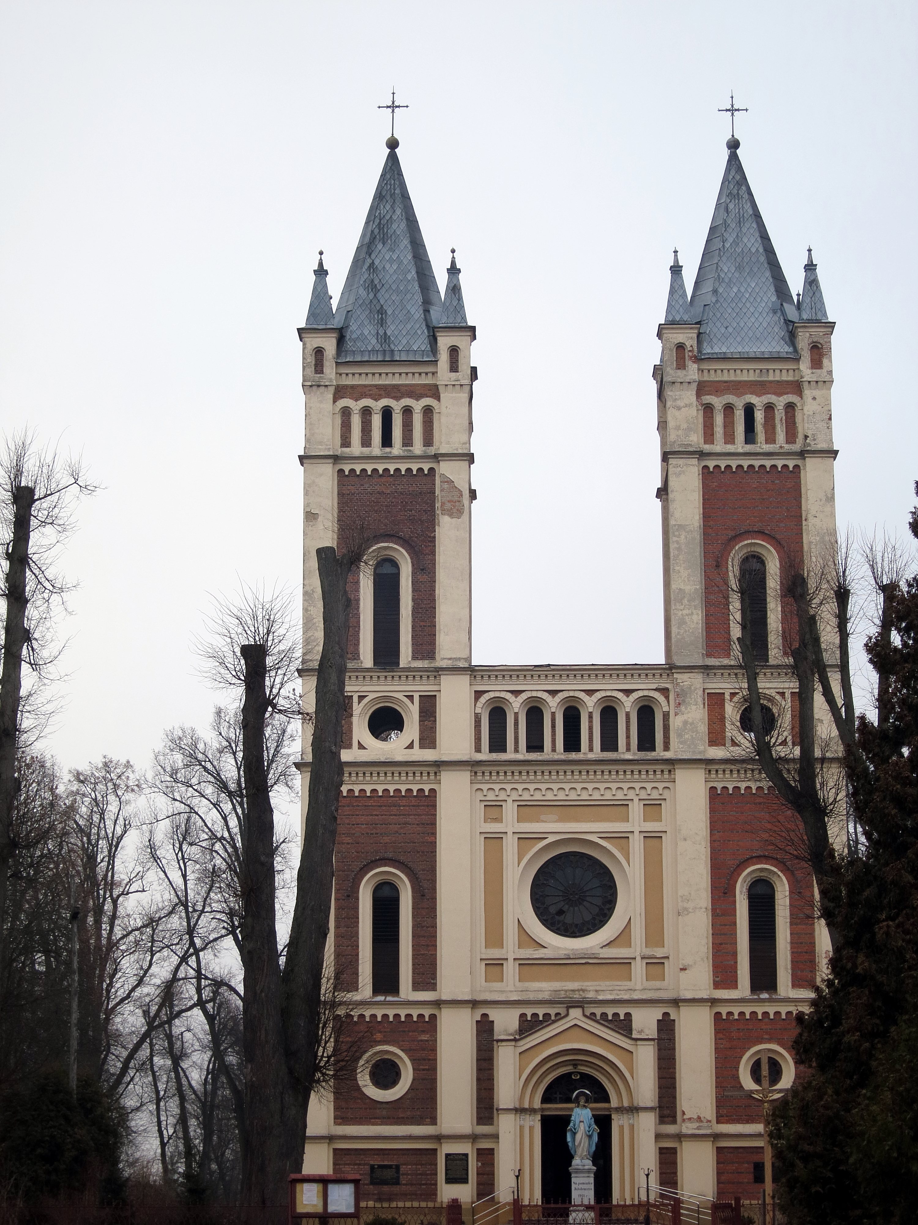 Żytno, kościół par. pw. Niepokalanego Poczecia NMP, 1860-1865